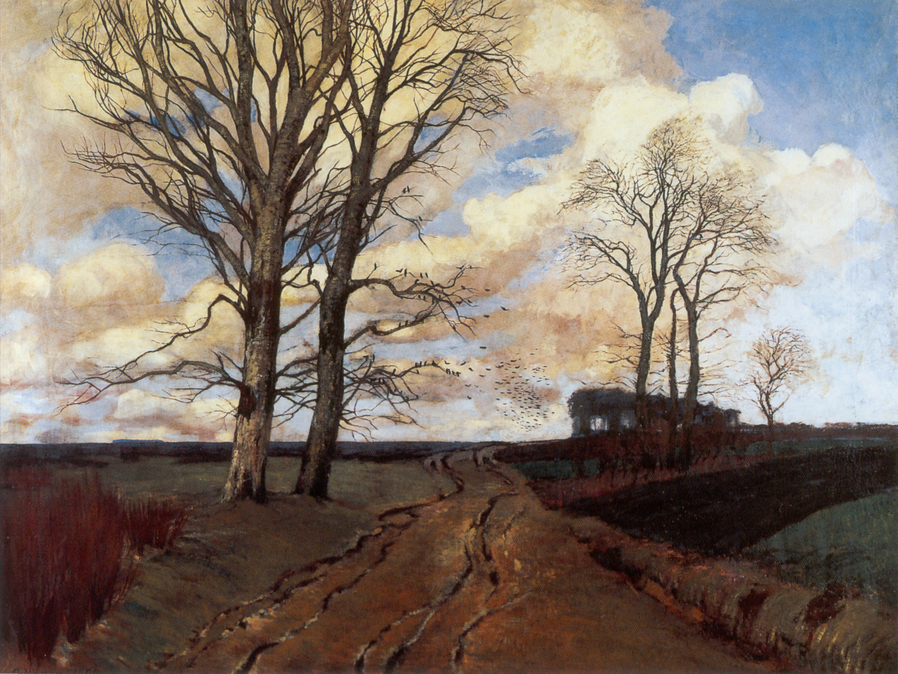 Weg ins Moor, 112 x 155 cm